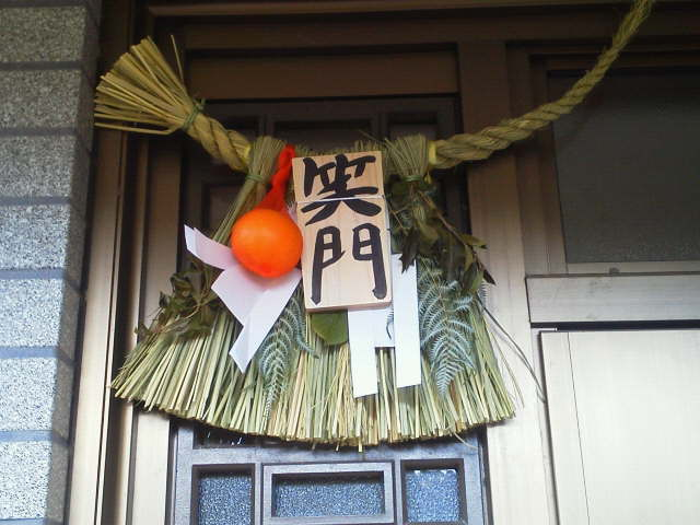 伊勢の注連縄